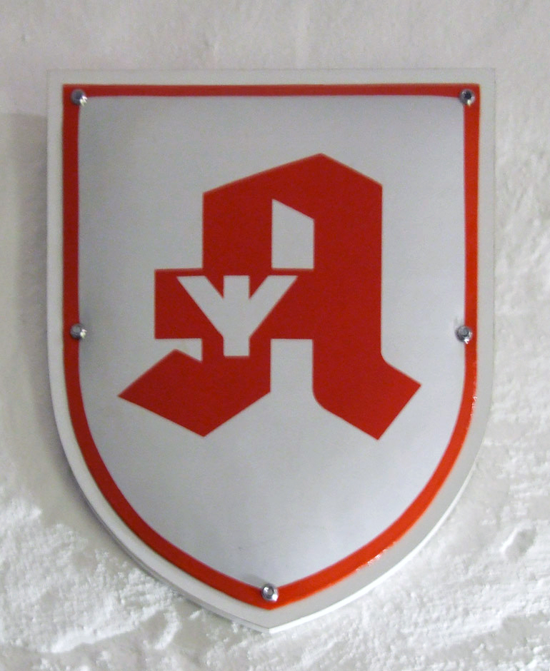 Deutsches Apotheken-Logo mit "Lebensrune" (Elhaz-Rune)